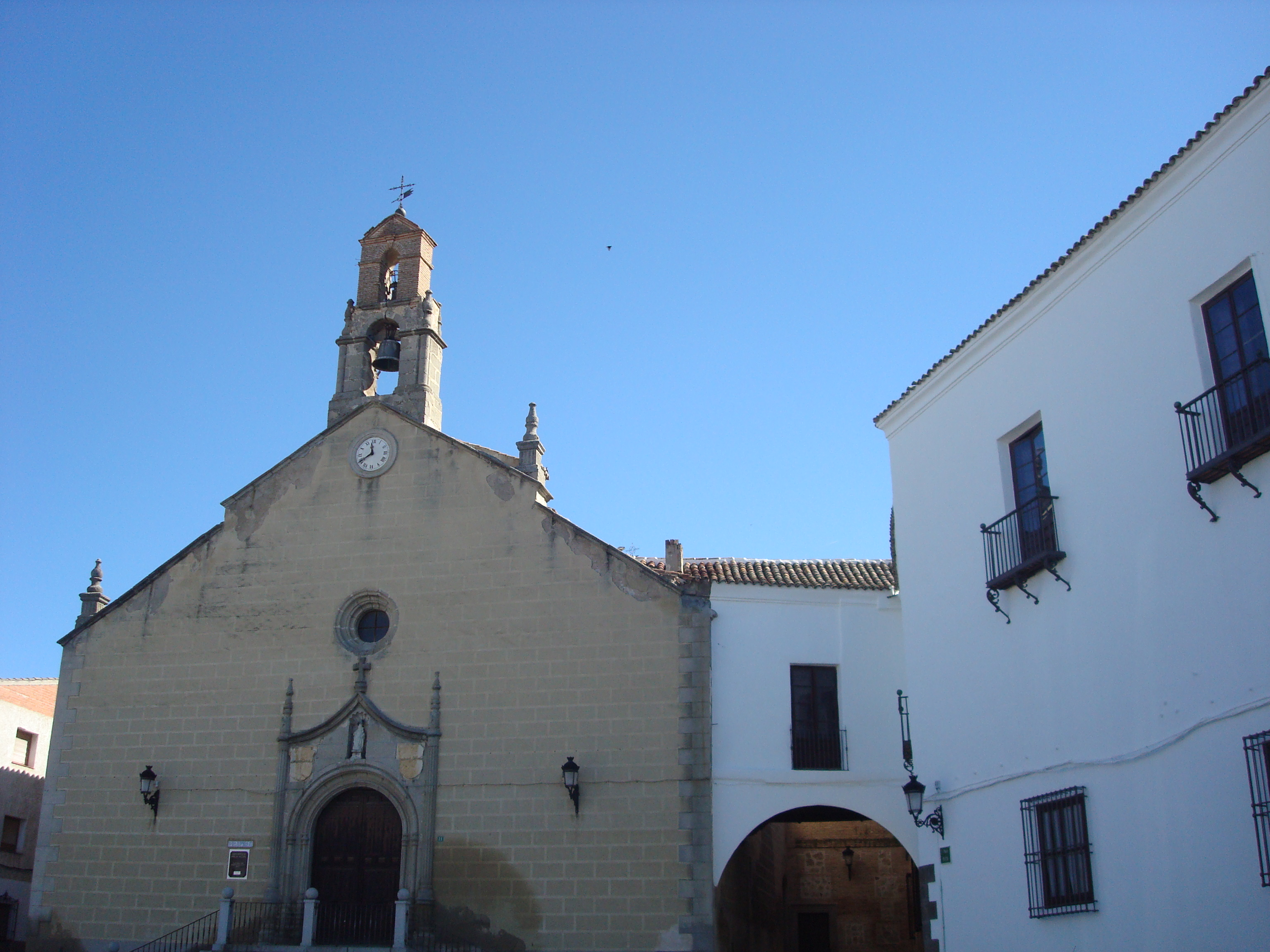 La Puebla de Montalban - 004